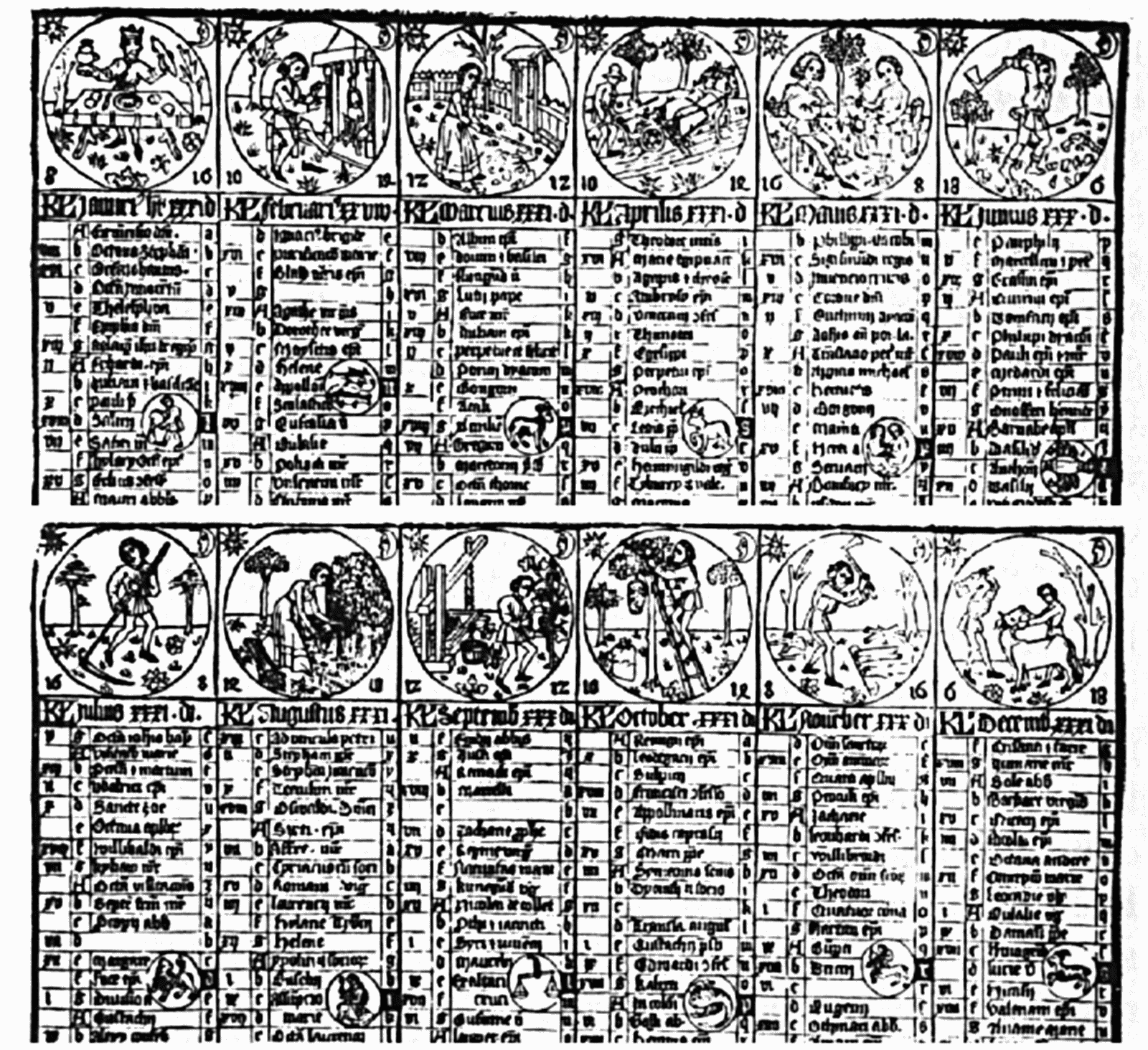 Xylographischer Kalender von 1439